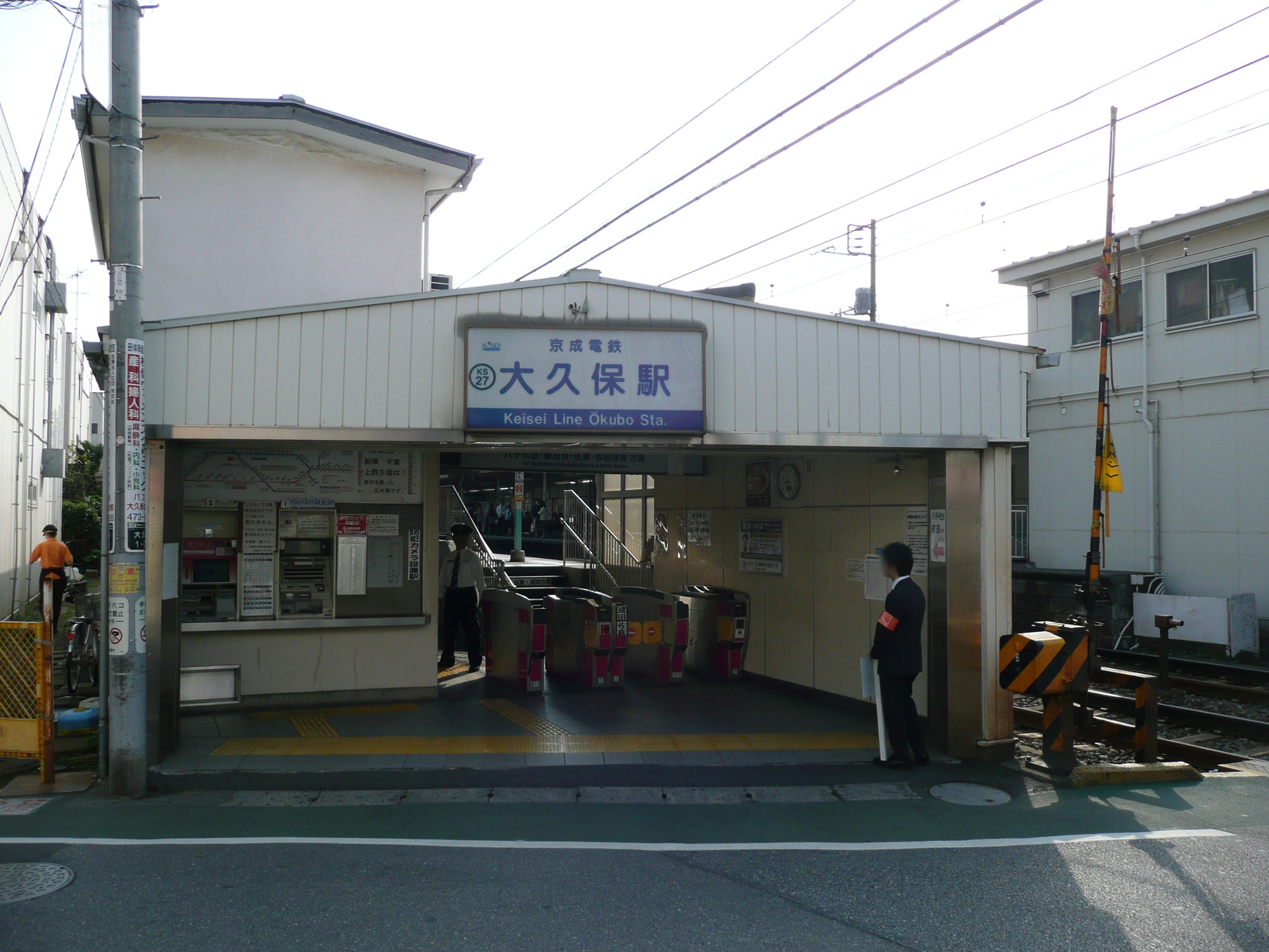 京成大久保駅下り線側駅舎